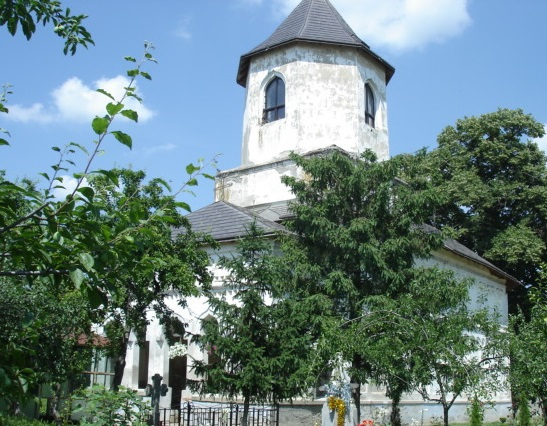 Biserica Sf Nicolae Mironesti